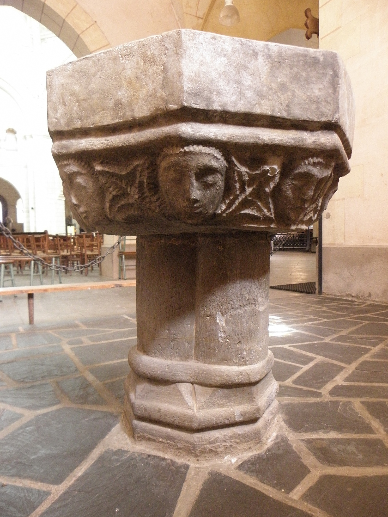 Fonts baptismaux de l'église Saint-Maxent de Maxent (35).